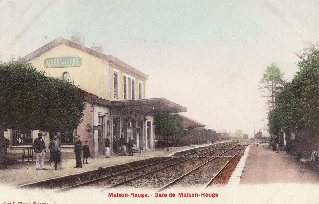 Ancienne gare de Maison-Rouge, Seine-et-Marne, France.